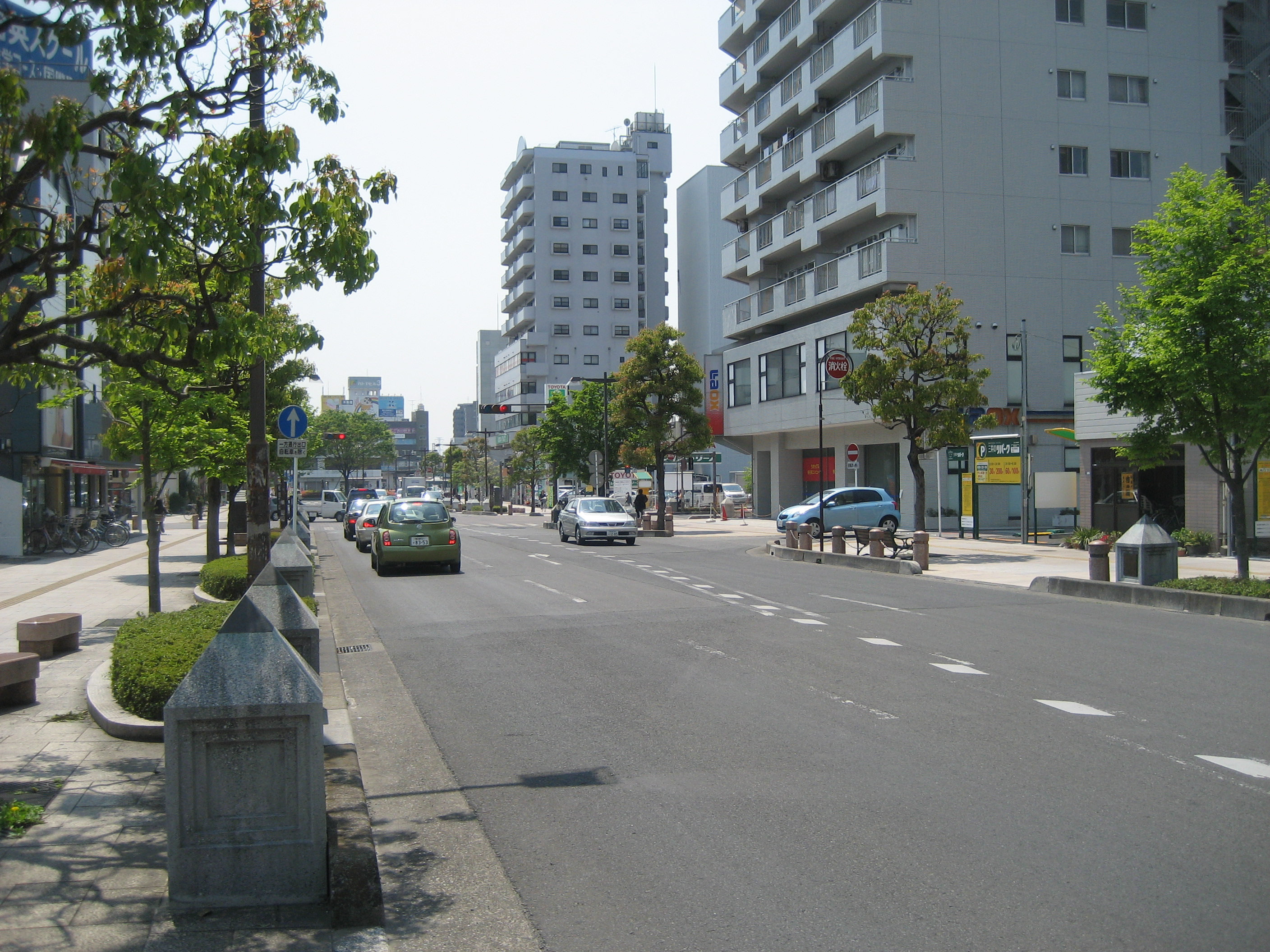 埼玉県道400号春日部市内